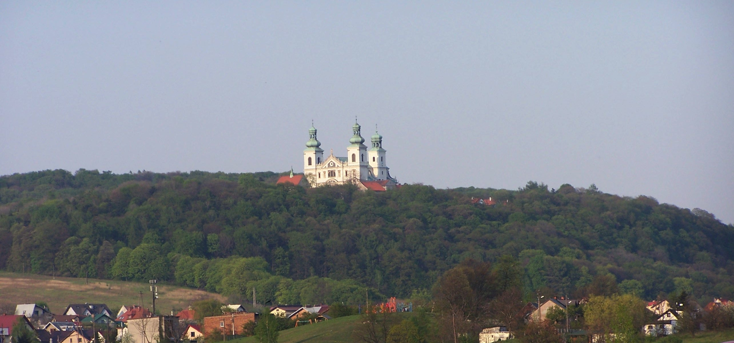 Las Wolski (Kraków)